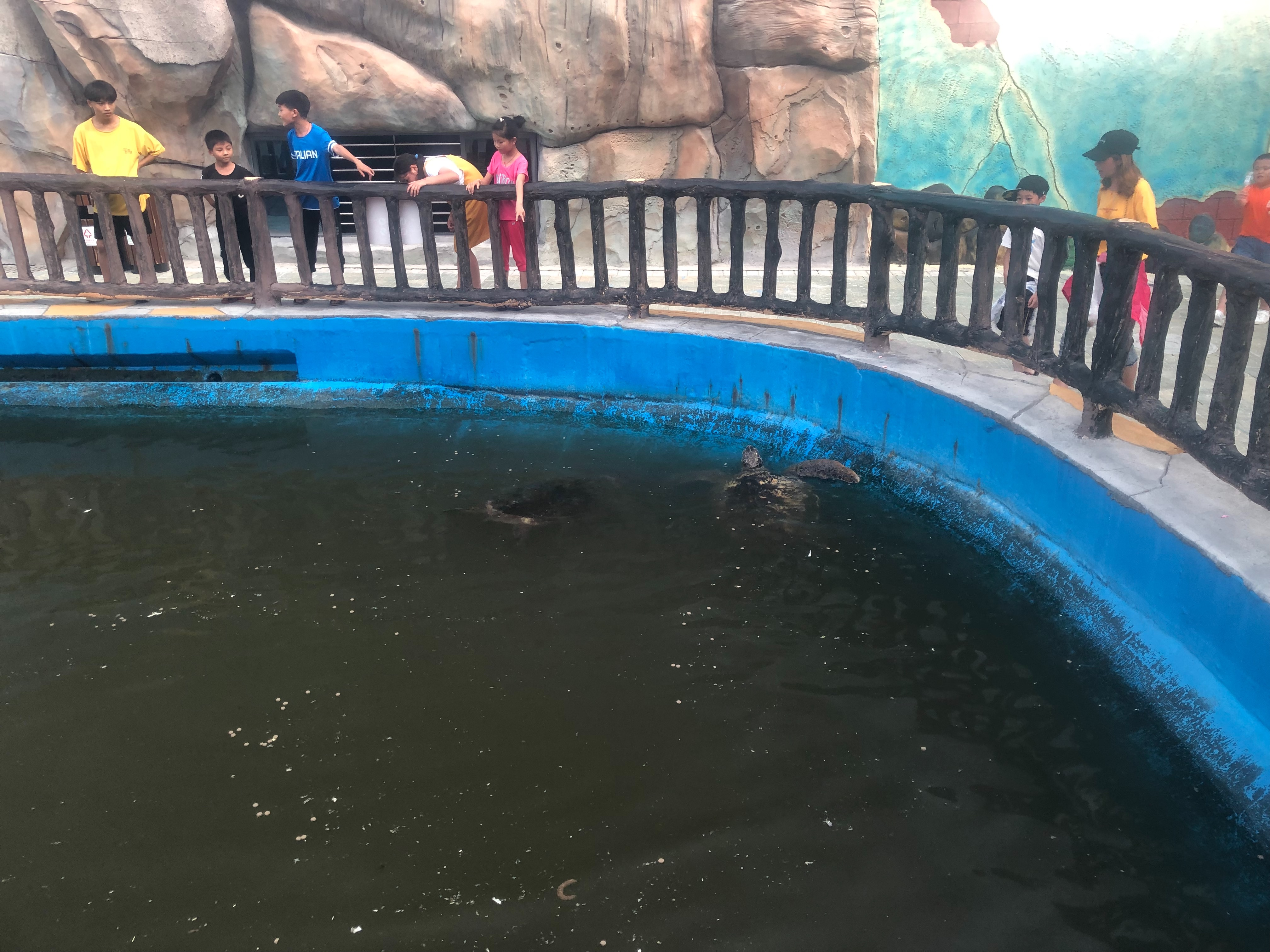 我的图片图片图片